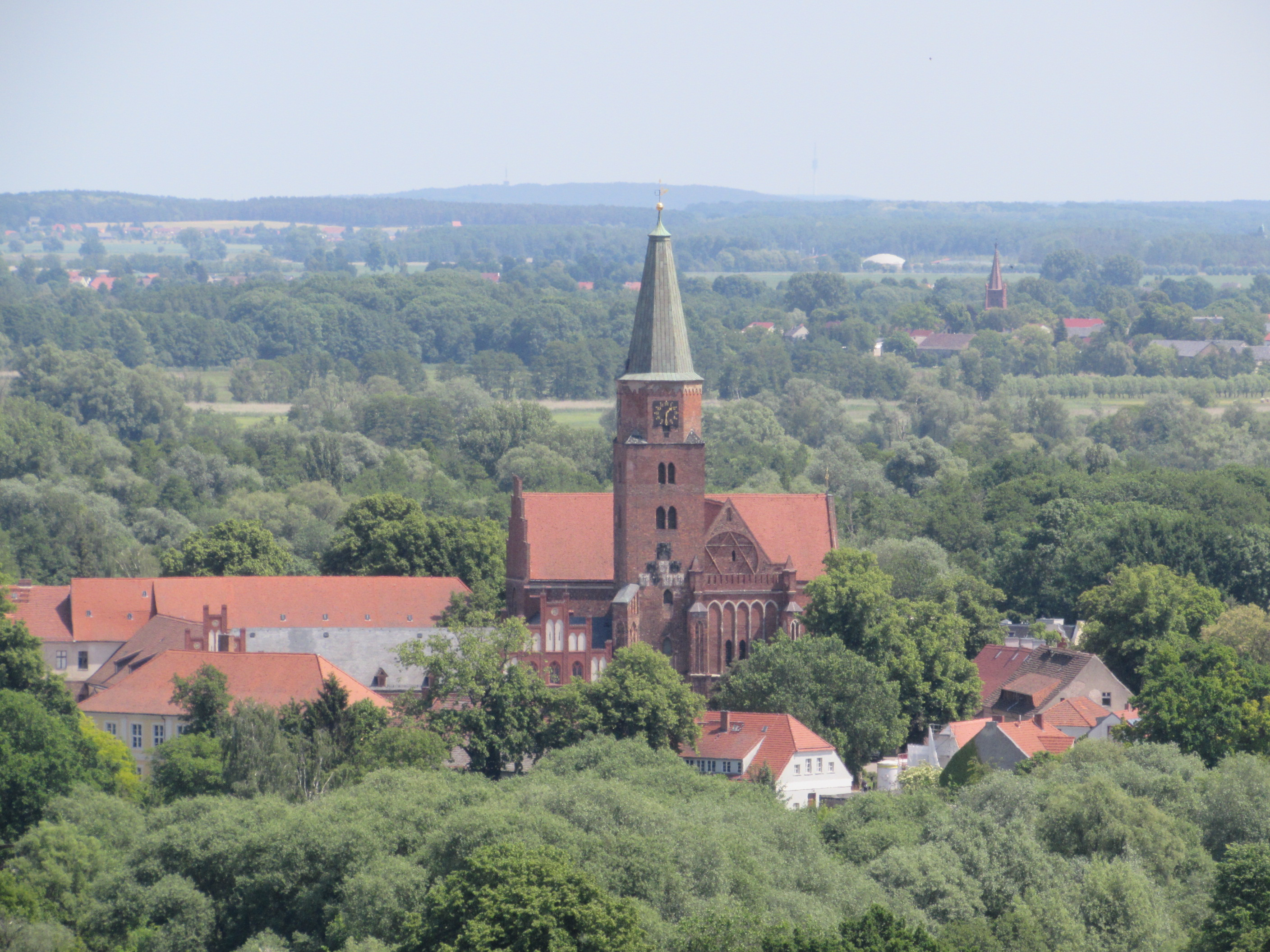 dom brandenburg von friedenswarte